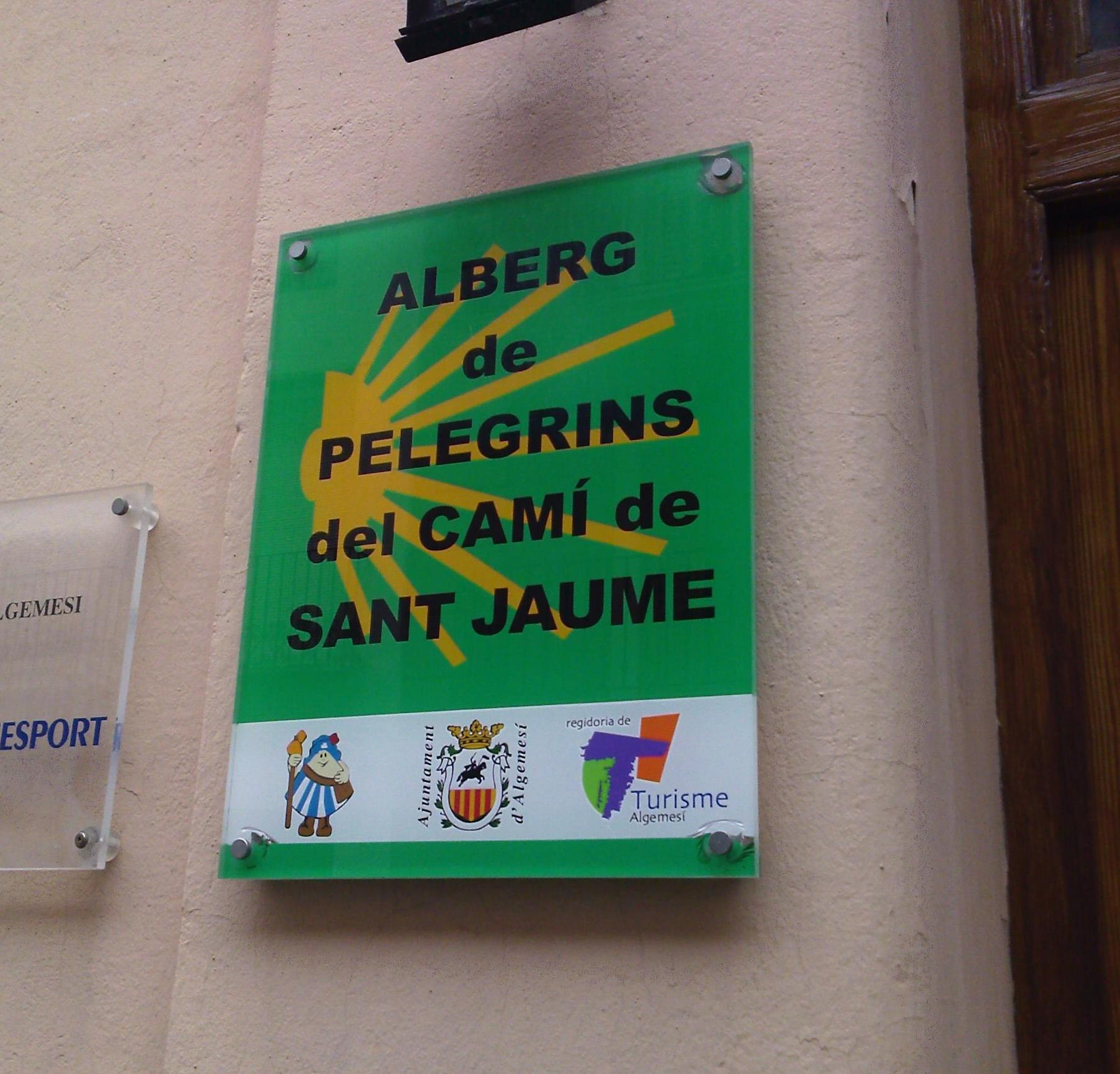 Albergue del Camino de Santiago de Algemesí